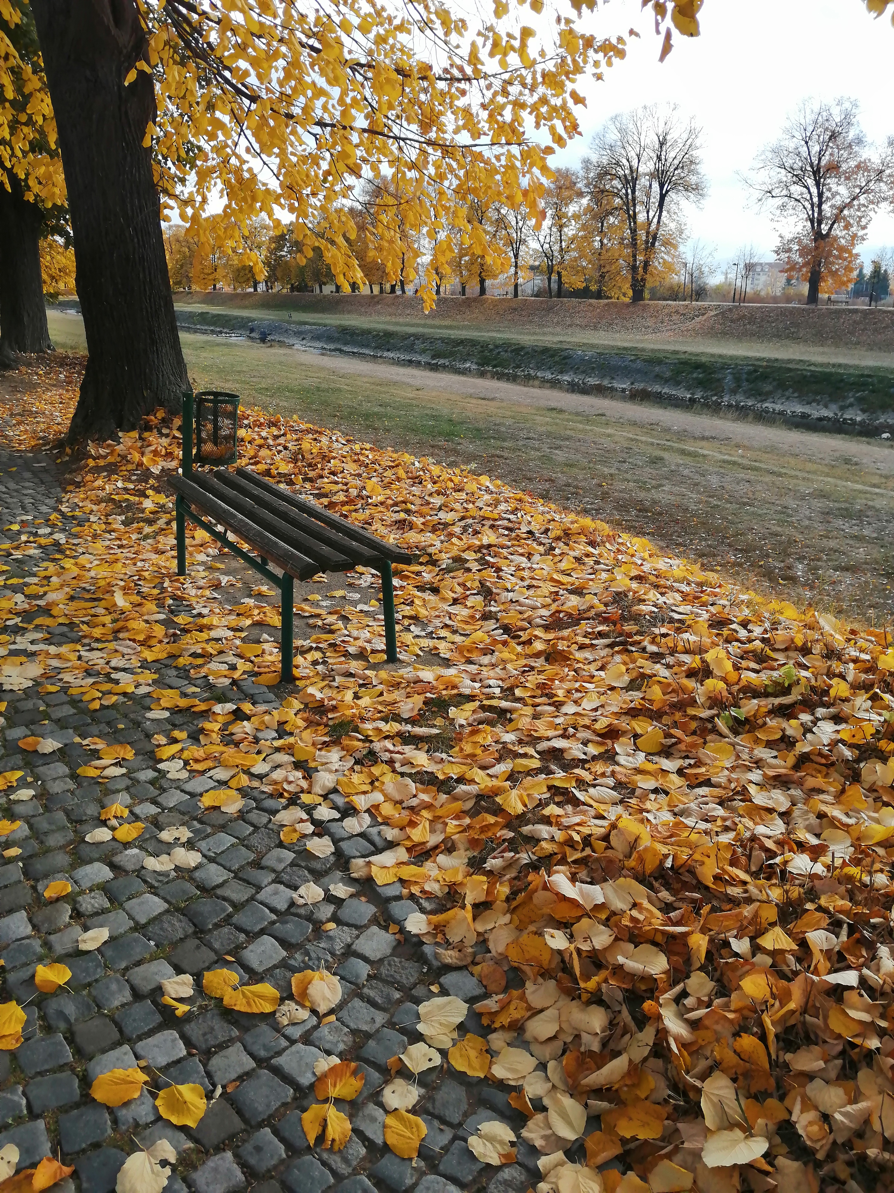 Pirotski kej